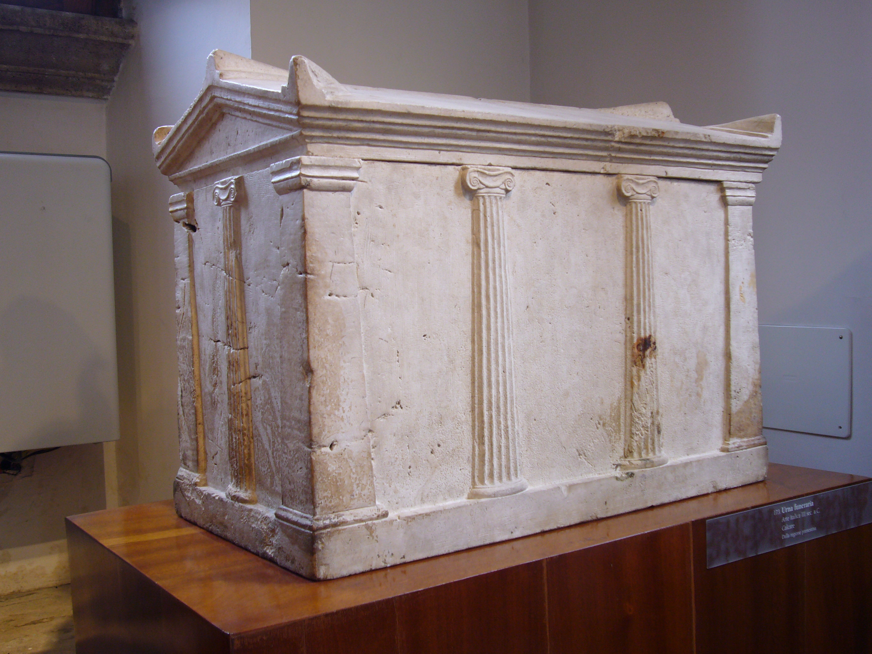 Roma, Museo Barracco: Urna funeraria a forma di tempio. Da Preneste (III sec. aC)